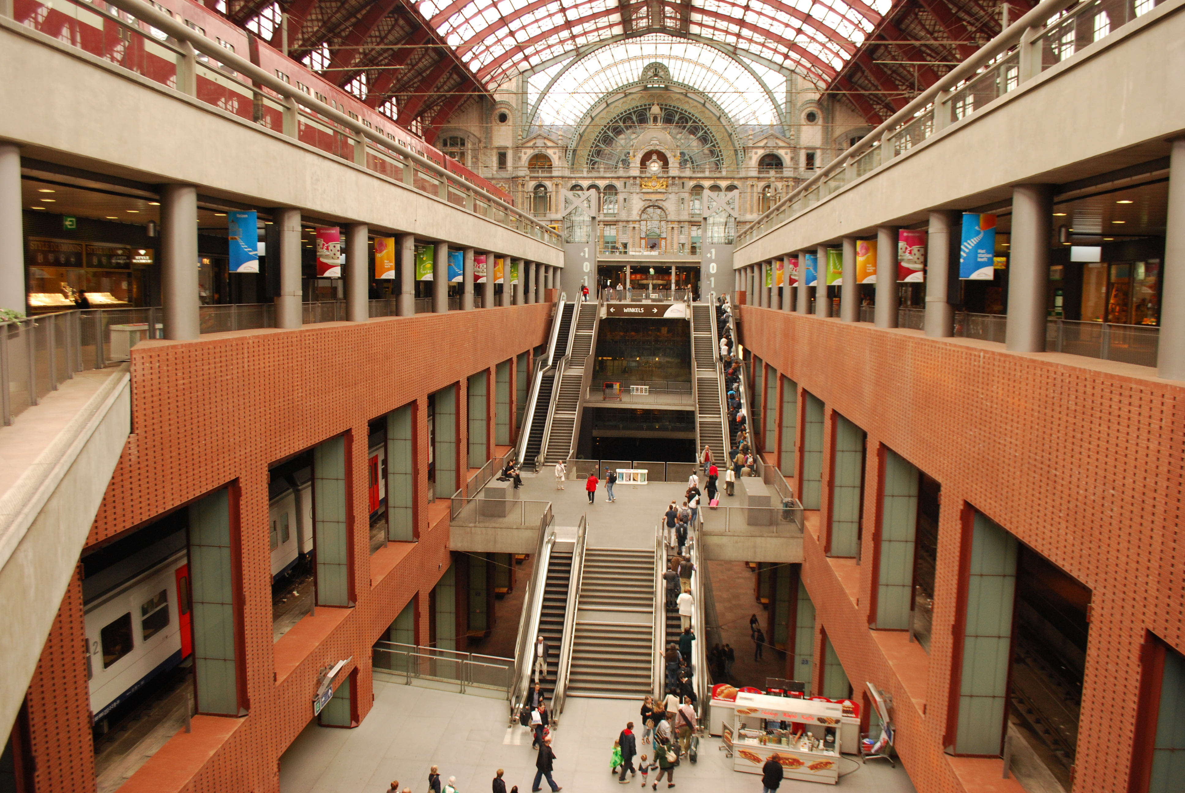 La gare centrale d'Anvers, la Belgique.